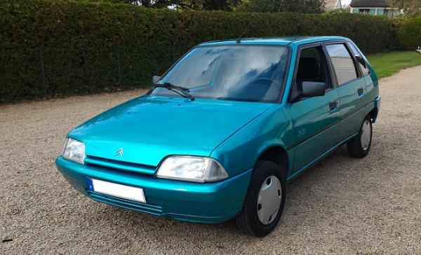 AX Spot 1995